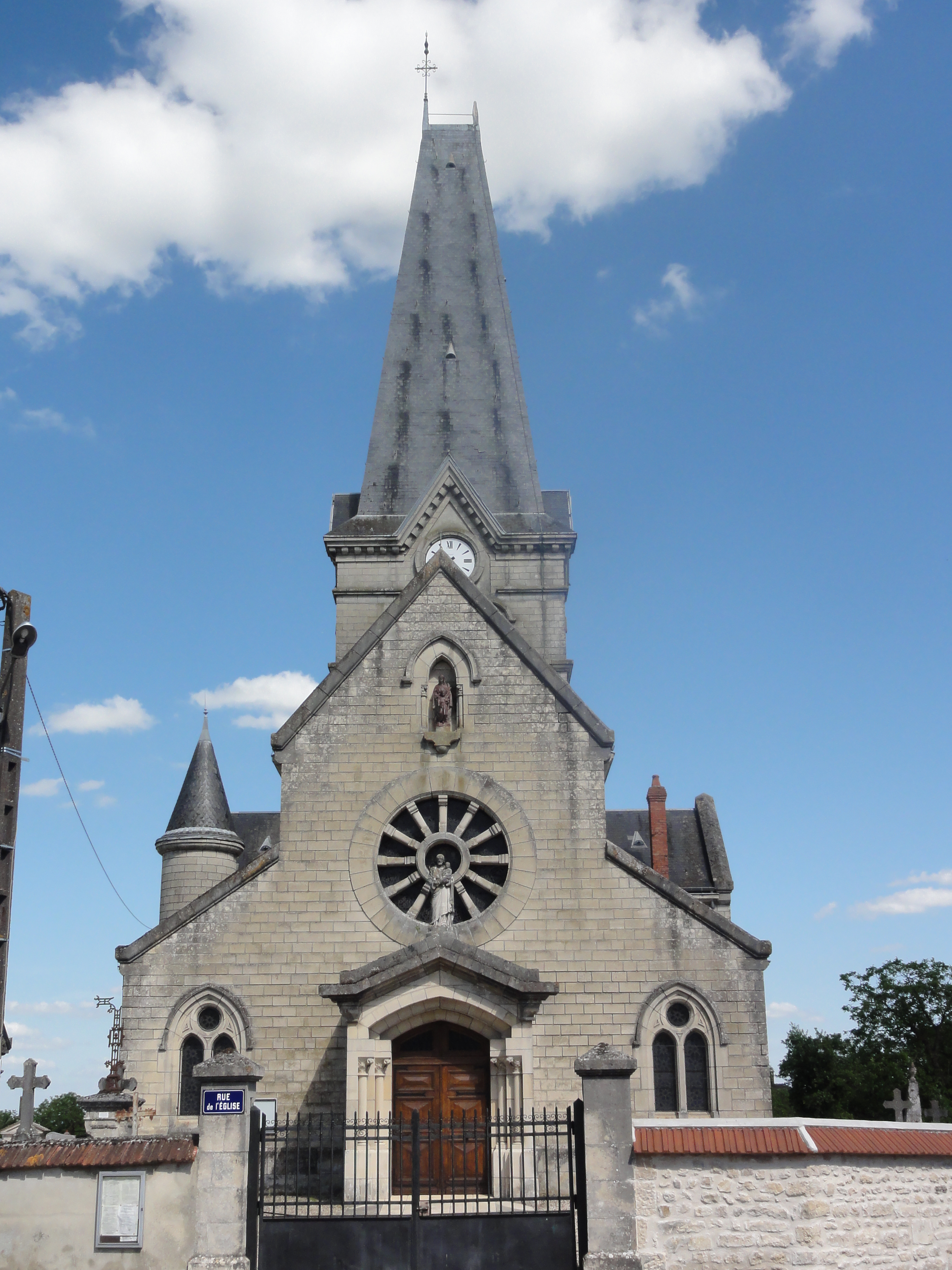 Berrieux (Aisne) église